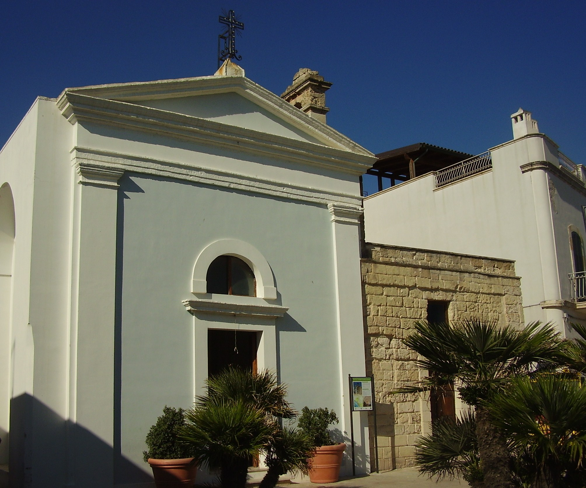 Porto Cesareo, chiesa della Madonna del Perpetuo Soccorso.